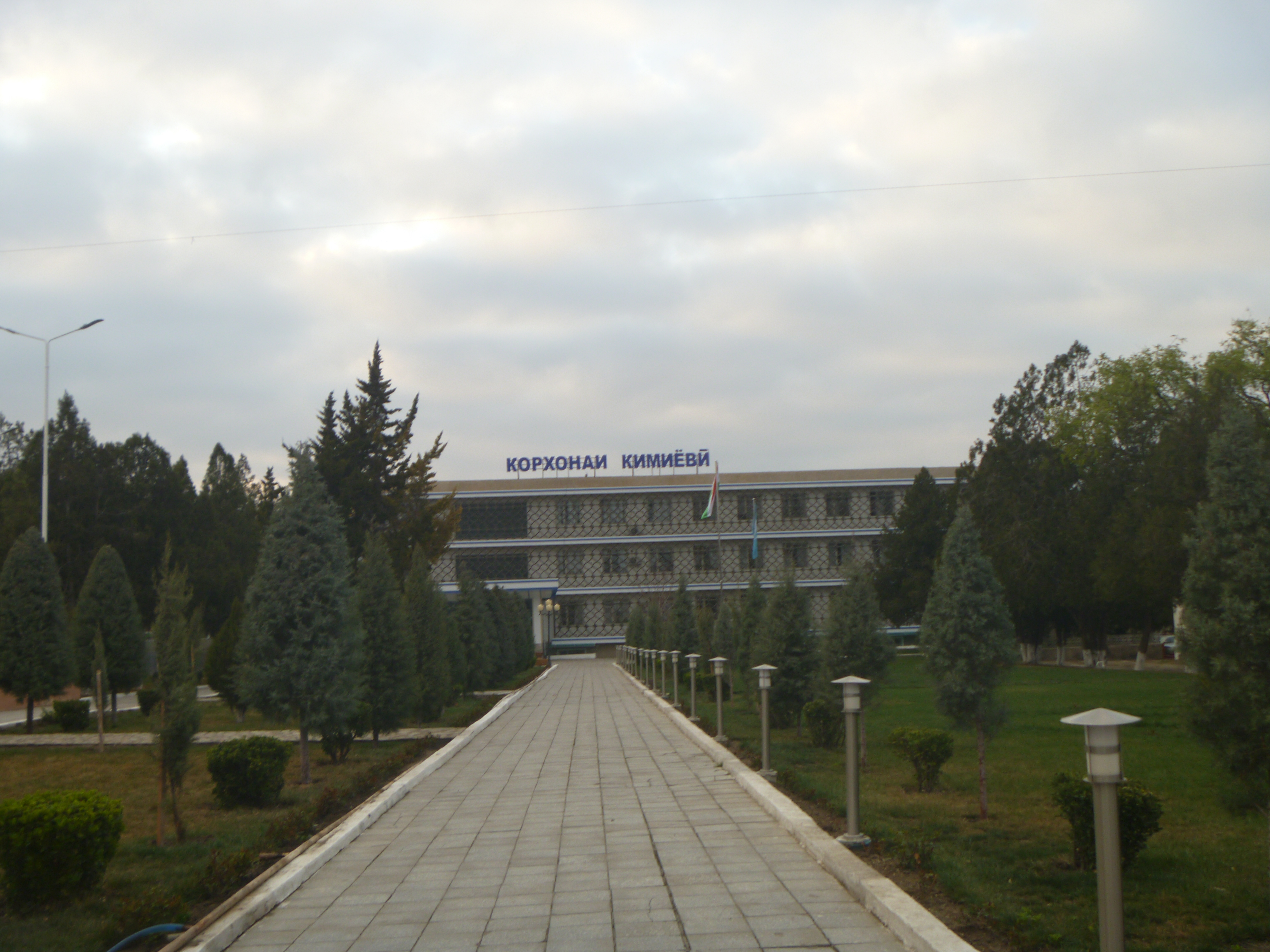 Управление химическим заводом г. Исфара Тоҷикӣ: Корхонаи заводи қимиёвӣ ш. Исфара